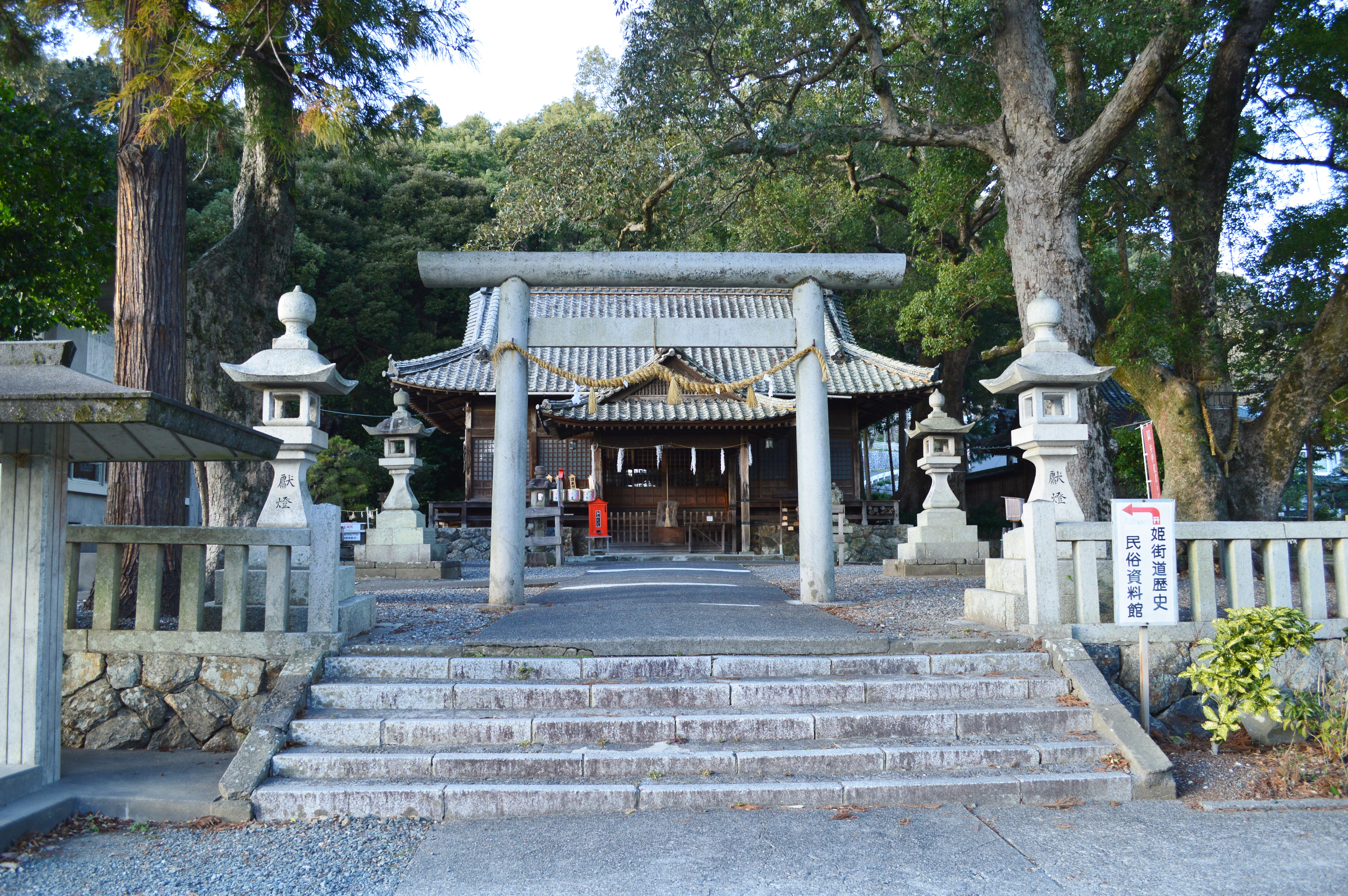 細江神社 境内入り口